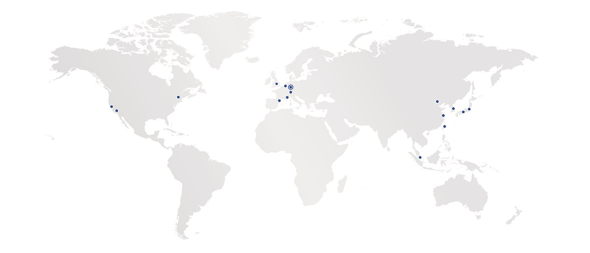 PI Subsidiaries Worldwide